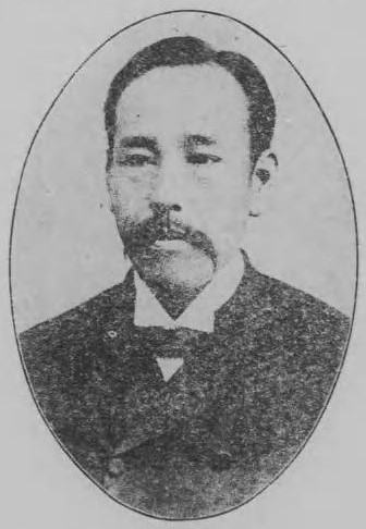 渡辺福三郎（1855～1934）